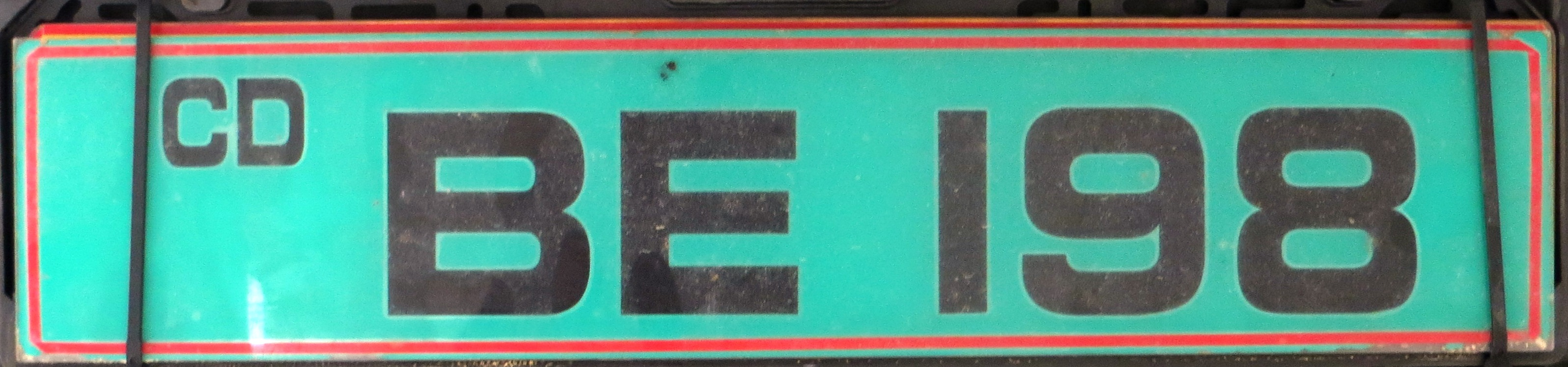 CD kenteken plaat van Noord Cyprus